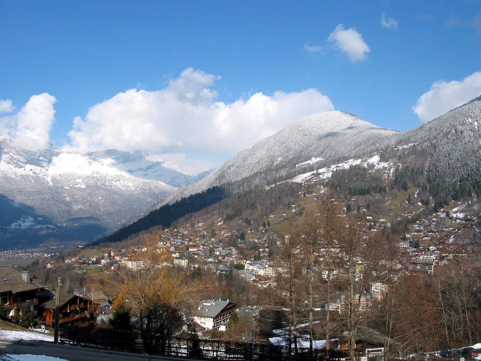 Saint-Gervais-les-Bains (Haute-Savoie - France), la ville vue depuis la rue du Mont Joly.